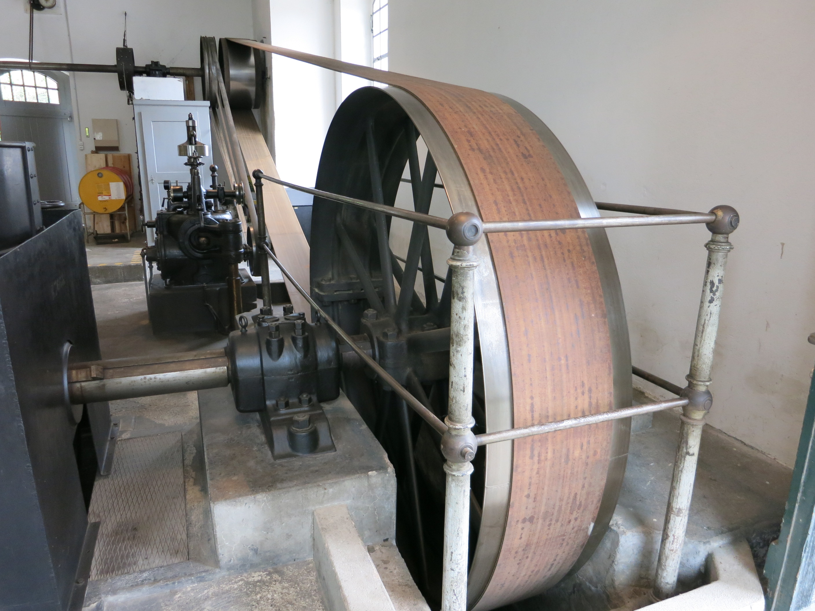 Historisches Kleinkraftwerk Ottenbach ZH, Schweiz